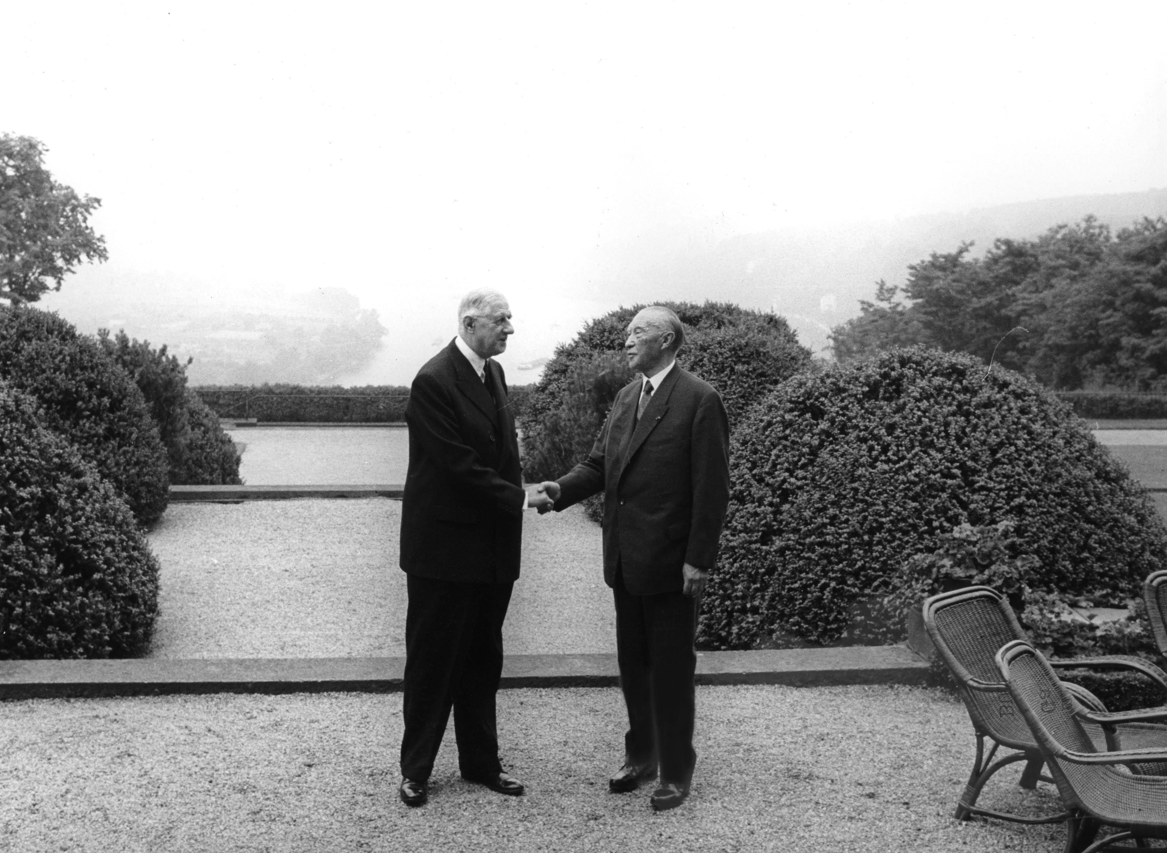 5. Juli 1963 Bundeskanzler Konrad Adenauer (rechts) und der französische Staatspräsident Charles de Gaulle im Garten der Residenz des französischen Botschafters in Bonn (Schloß Ernich)